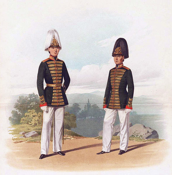 Камер-Паж и Паж Пажеского Его Императорского Величества Корпуса. 13 Апреля 1855. (В придворной форме).